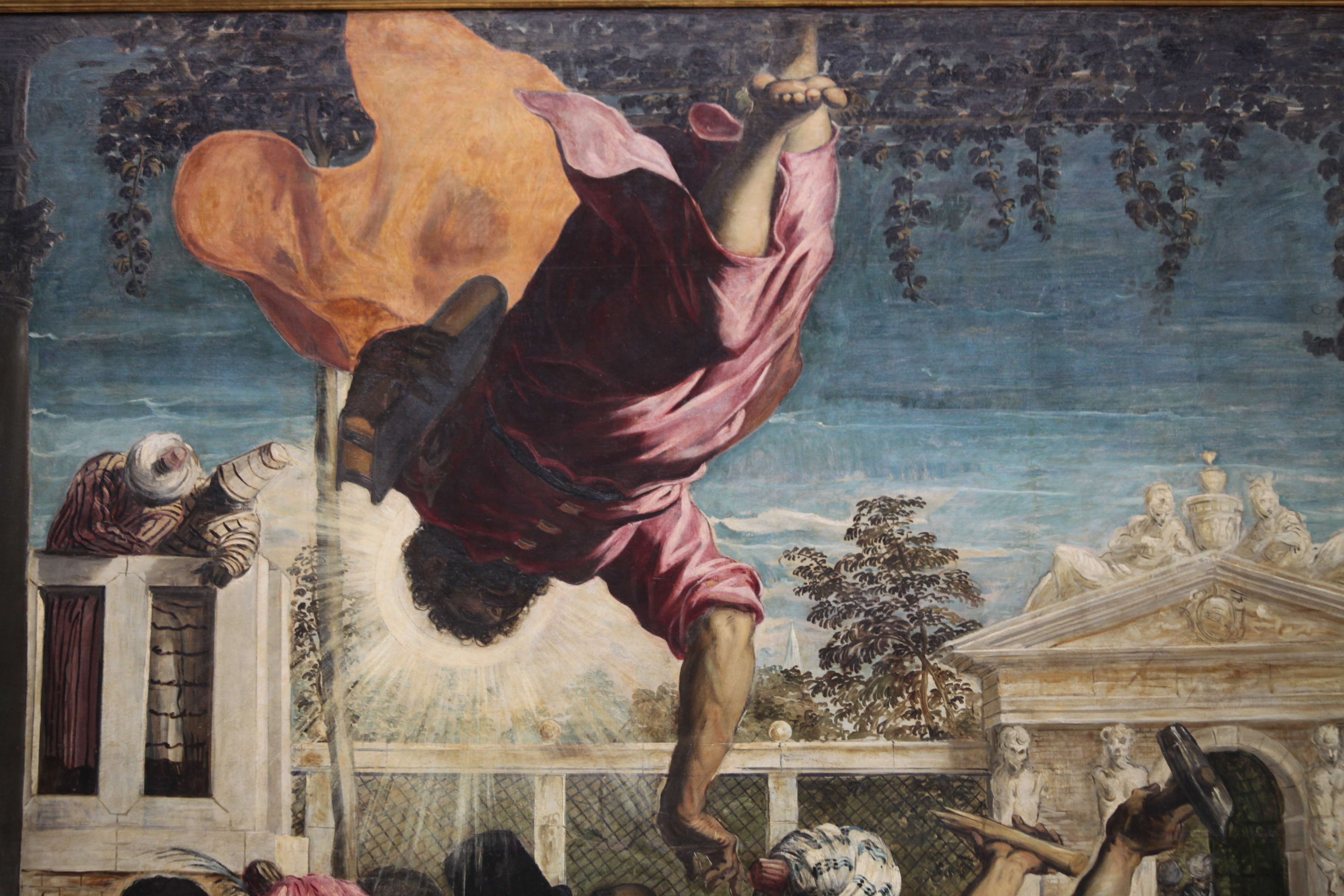 Gallerie dell'Accademia - MIBAC This is a photo of a monument which is part of cultural heritage of Italy.